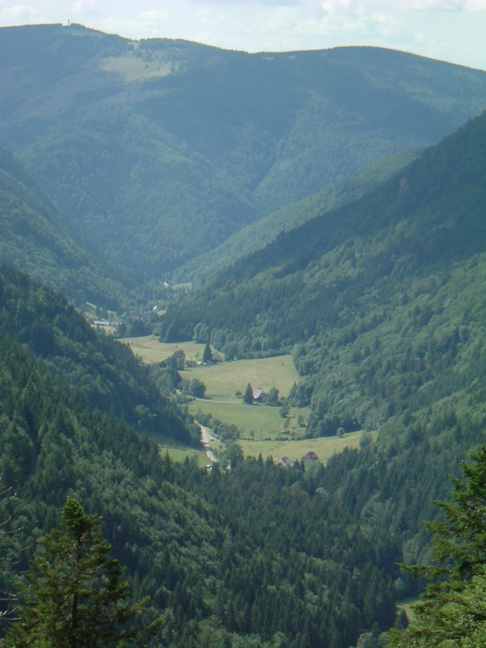 Blick vom Alpinen Pfad aus übers Wilhelmer Tal zum Schauinsland im Schwarzwald, Baden-Württemberg, Deutschland